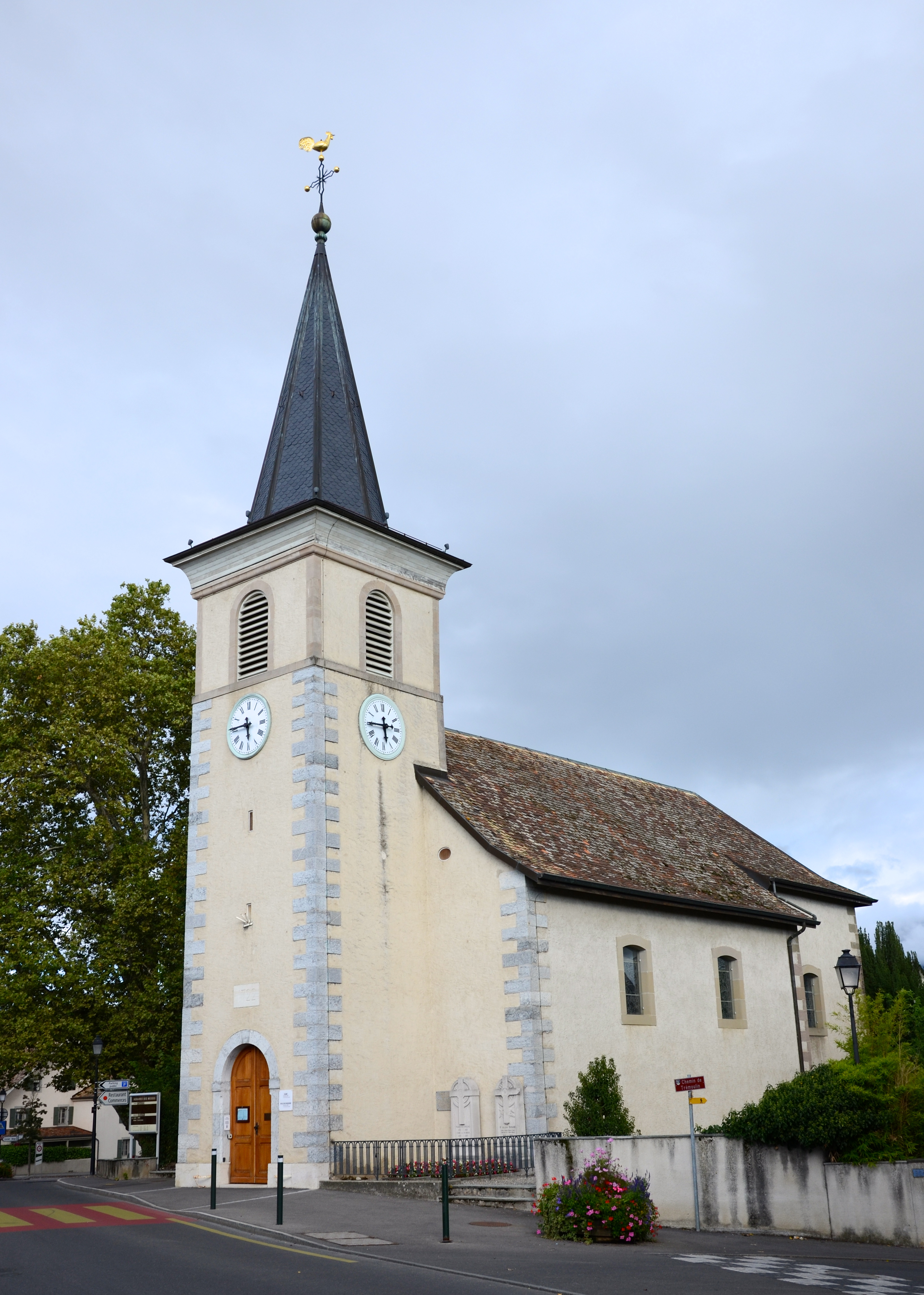 Eglise Saint-Pierre, Route de Gy 42, Meinier